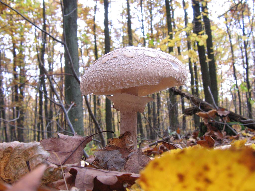 fotka houby